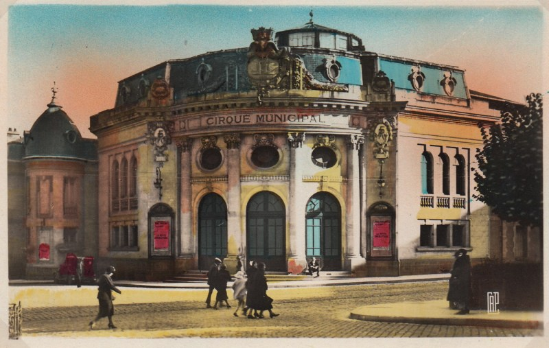 Cirque municipal de Limoges (inauguré en 1921, demoli en 1958), carte postale ancienne